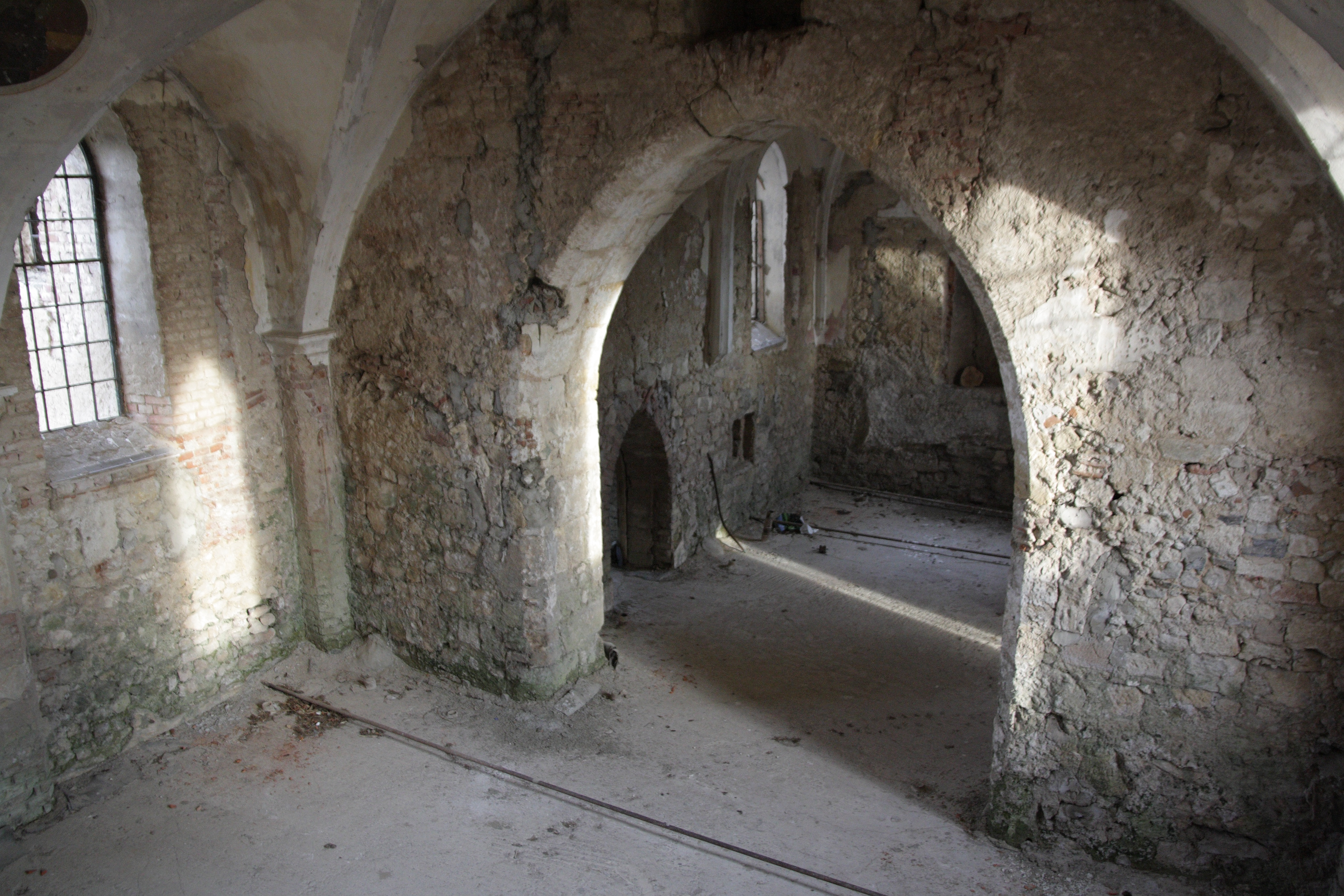 Mušov - kostel svatého Linharta. Pohled z kruchty do lodi.